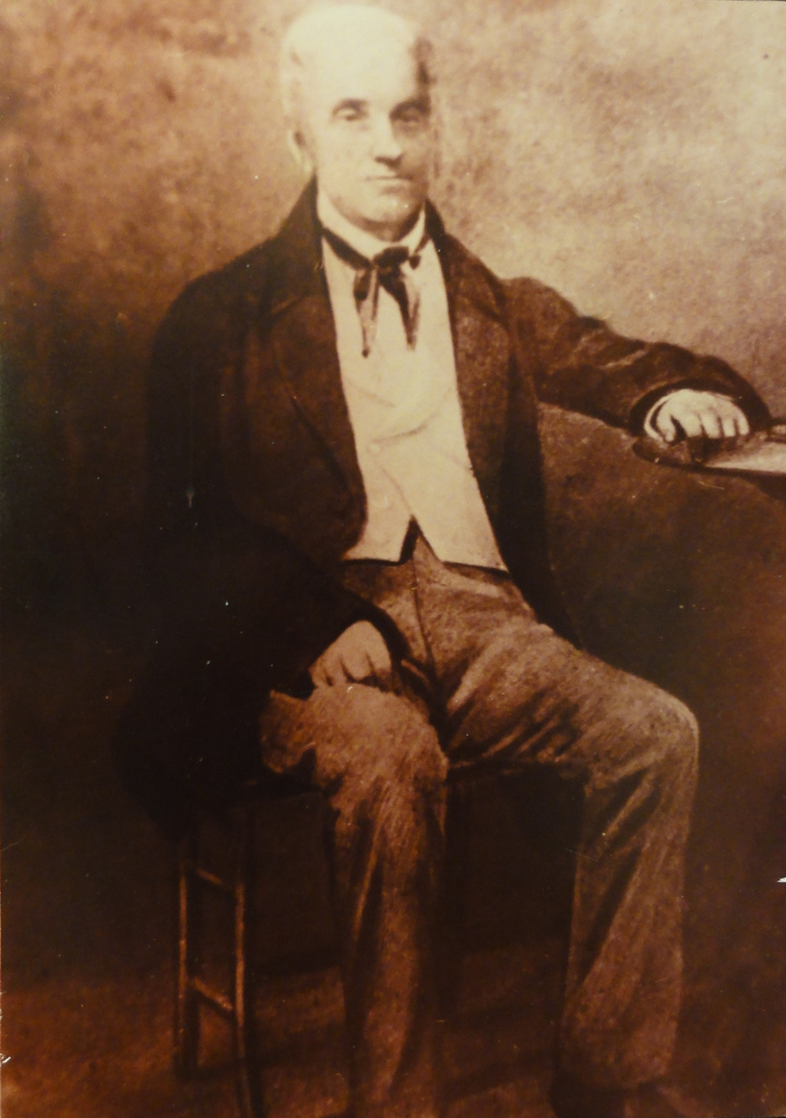 Jose Ortiz de la Renta, mayor of Ponce, Puerto Rico